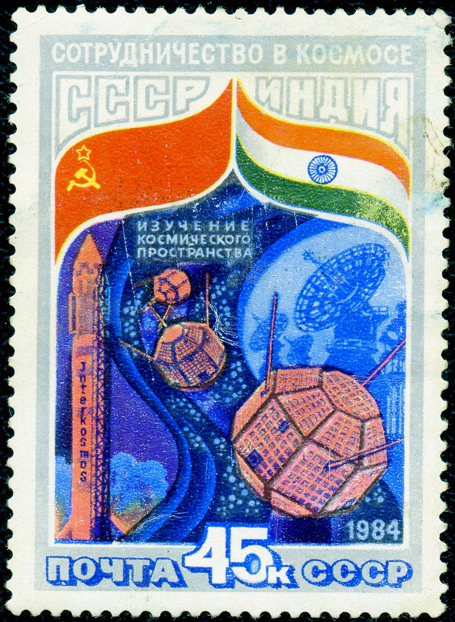 Почтовая марка СССР. 1984. Интеркосмос. Номер 5493 по каталогу ЦФА. Согласно каталогу почтовых марок СССР за 1985 год, на марке изображены советская ракета «Интеркосмос», индийские спутники «Бхаскара», «Бхаскара II» и «Ариабата» и антенны советской станции слежения.